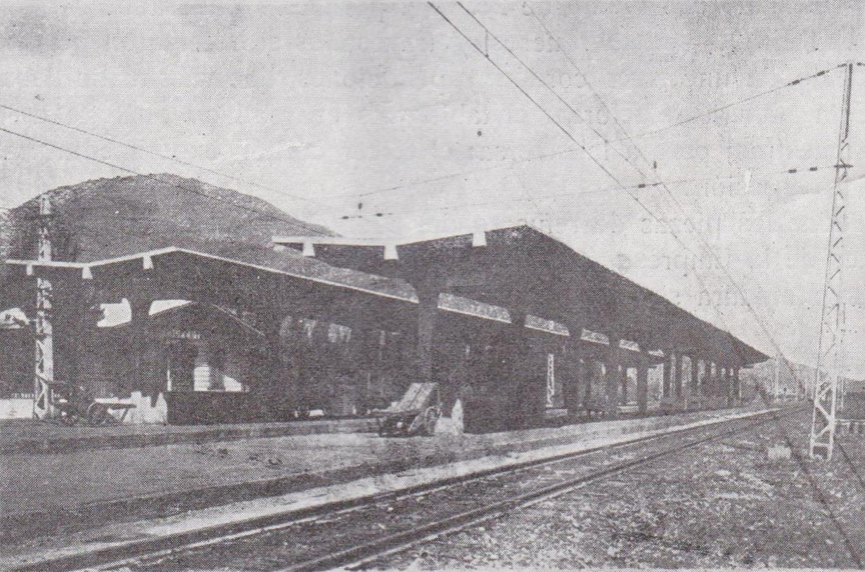 Estaciones modernas de concreto armado, estación Las Vegas. Circa 1929. Imagen obtenida a partir del libro (in Spanish) (1929) Ferrocarriles del Estado de Chile (3rd ed.), Santiago: Impr. Harris y Pascual